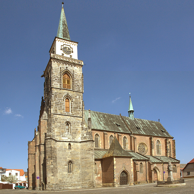 Kostel sv. Jiljí Nymburk